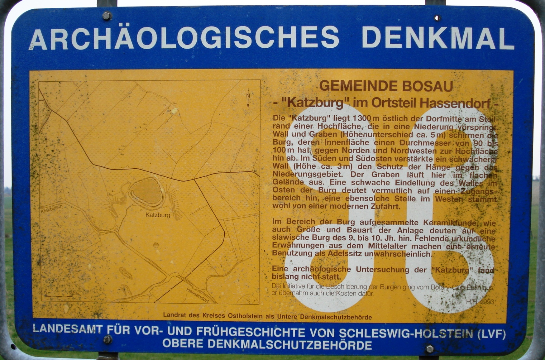 Die Informationstafel der Katzburg